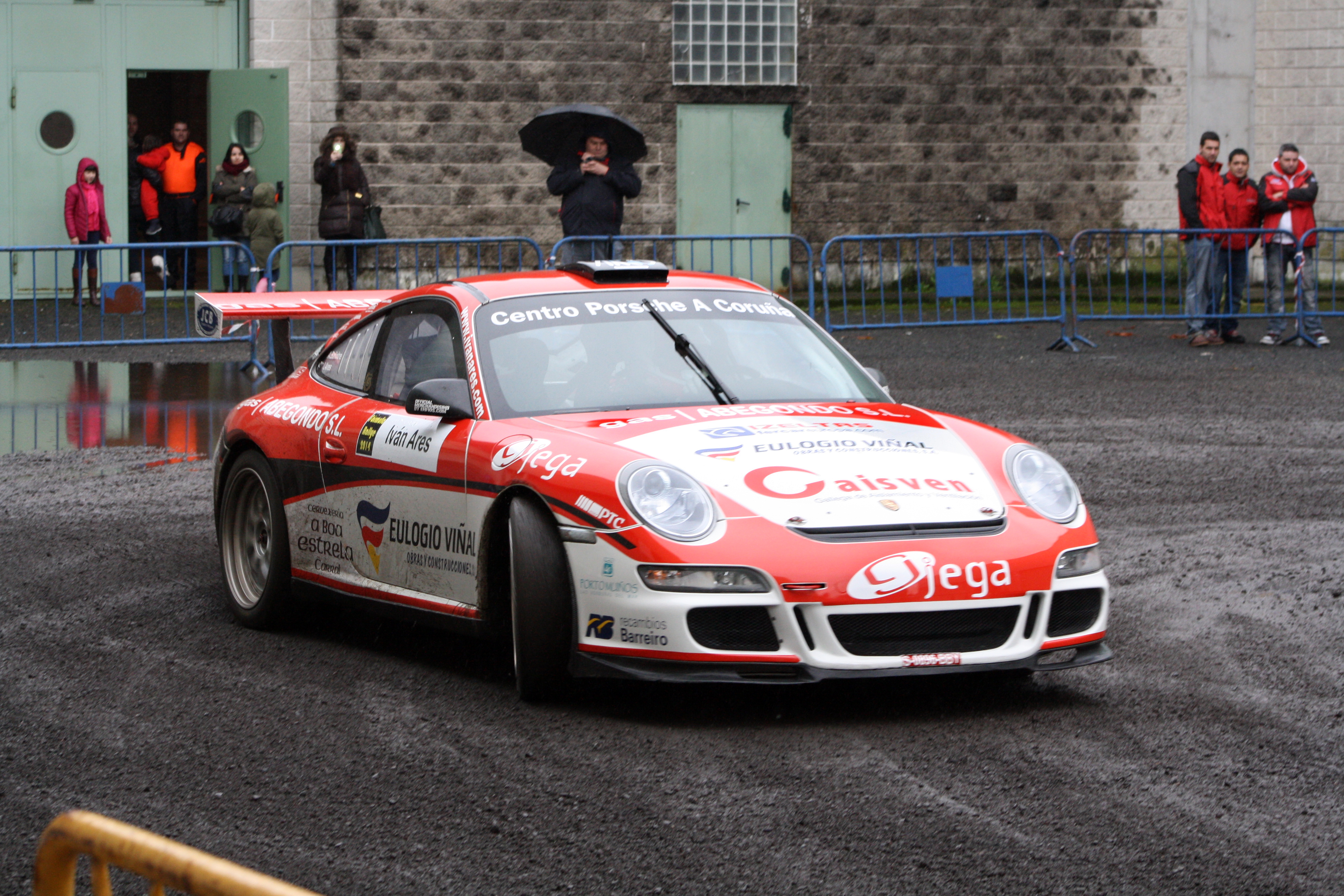 Formula Rally do Cocido 2014 celebrado en el Recinto Feiral de Silleda.